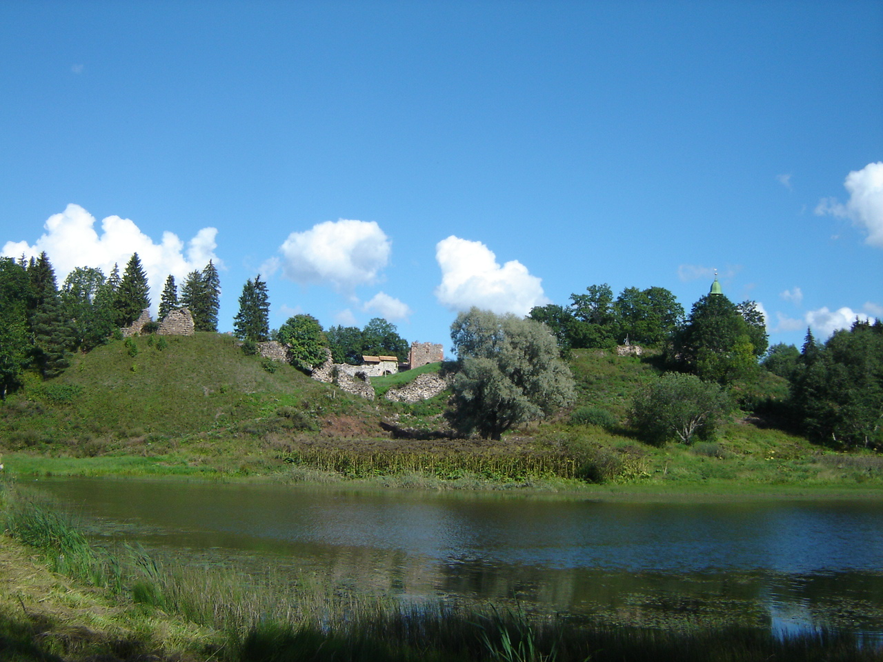 Karksi ordulinnuse varemed Halliste jõe ääres.